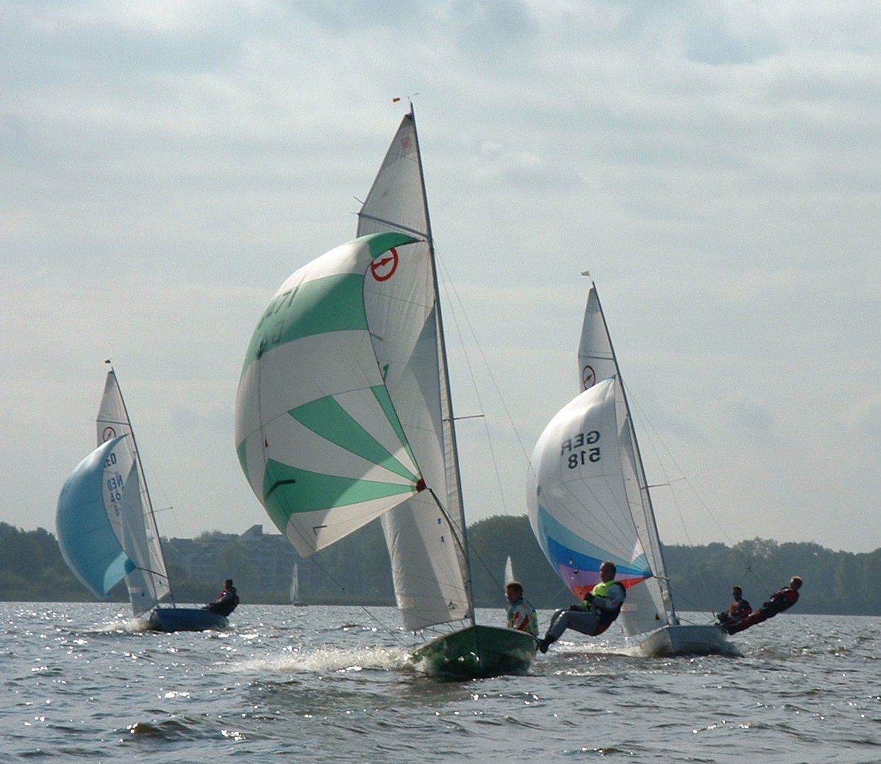 Javelin unter Spi